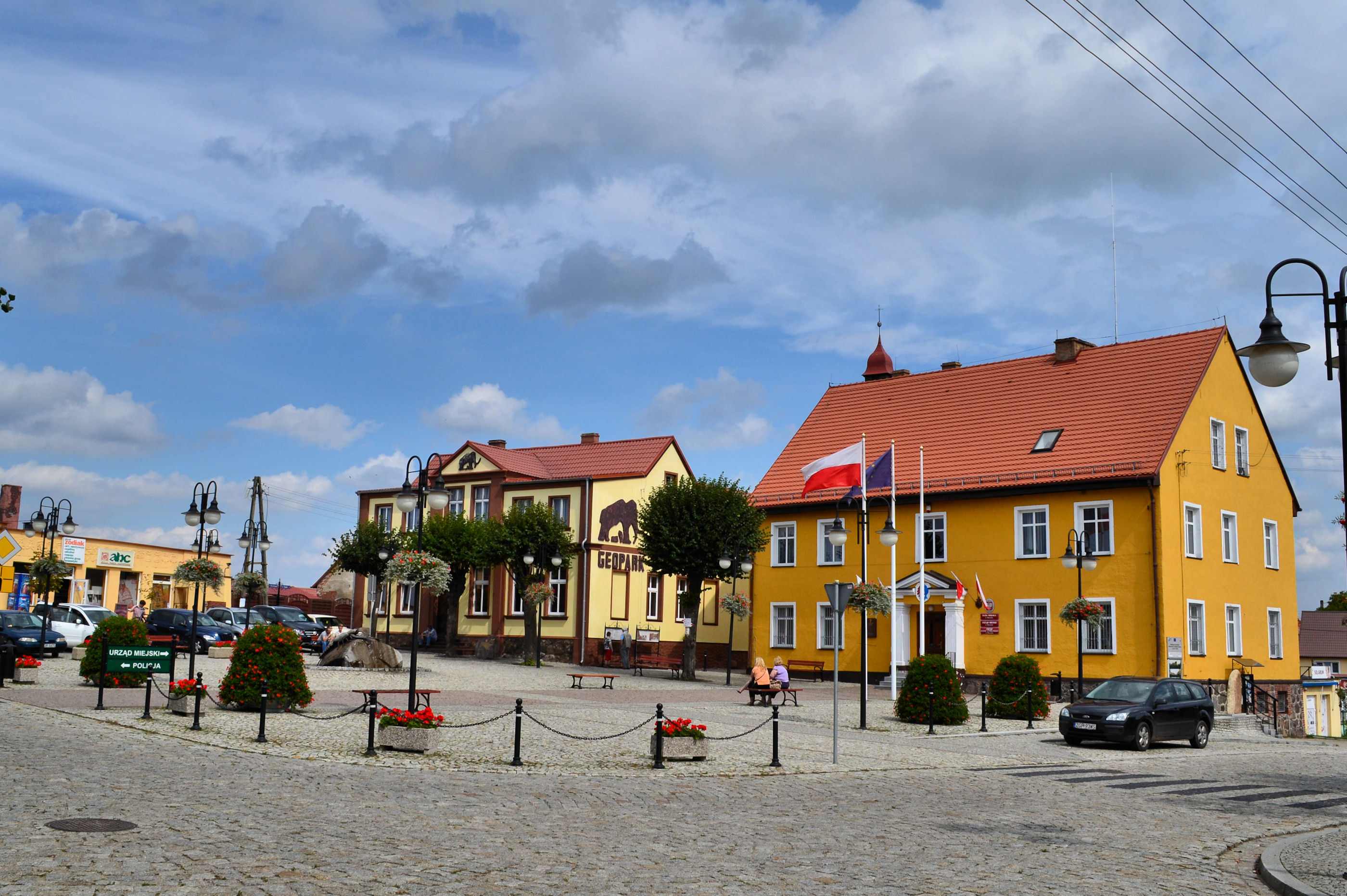 Moryń